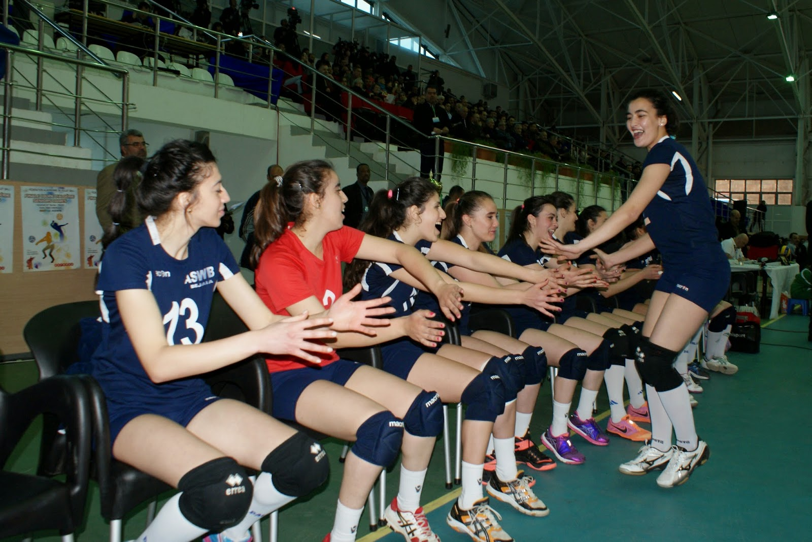 ياسمين أوصالح